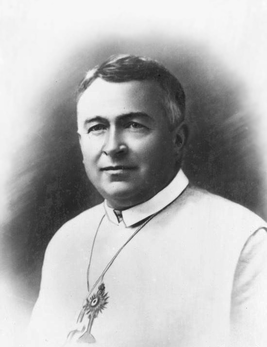 Abp Jan Maria Michał Kowalski - założyciel i pierwszy zwierzchnik Kościół Katolicki Mariawitów